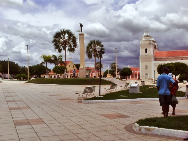 Centro da cidade de Açu,RN